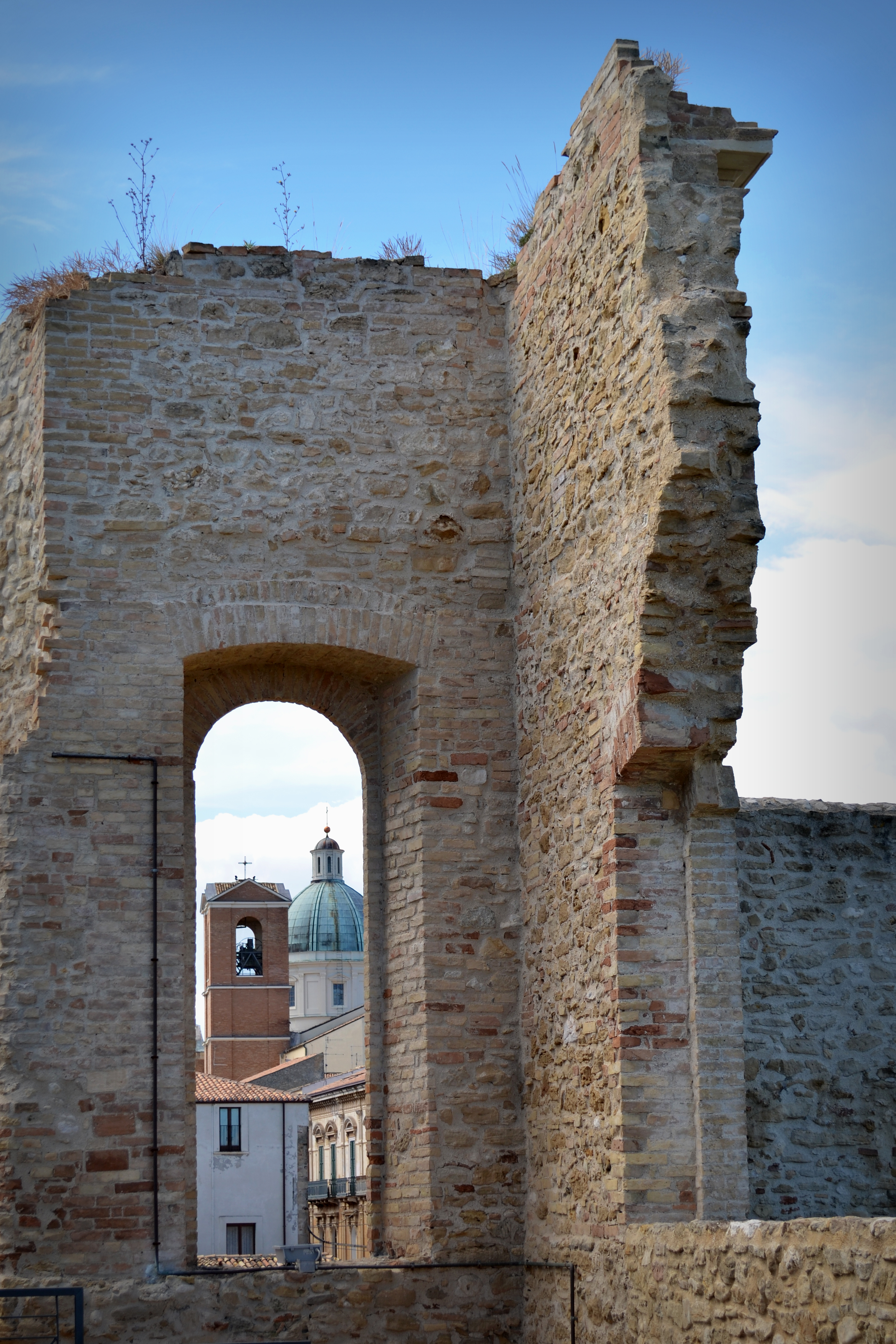 La cattedrale di San Tommaso vista dal Castello Aragonese This is a photo of a monument which is part of cultural heritage of Italy.